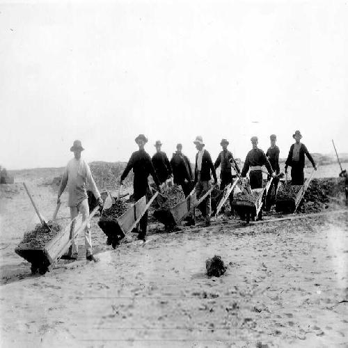 תל- אביב , בראשית בנינה , פועלים עברים מכשירים מגרש המיועד לבנין גמנסיה "הרצליה " . ( 1909 ) .